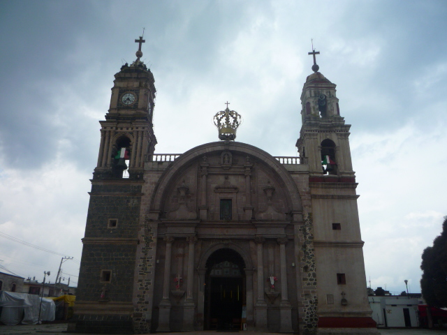 Iglesia de Gualupita Yancuictlalpan